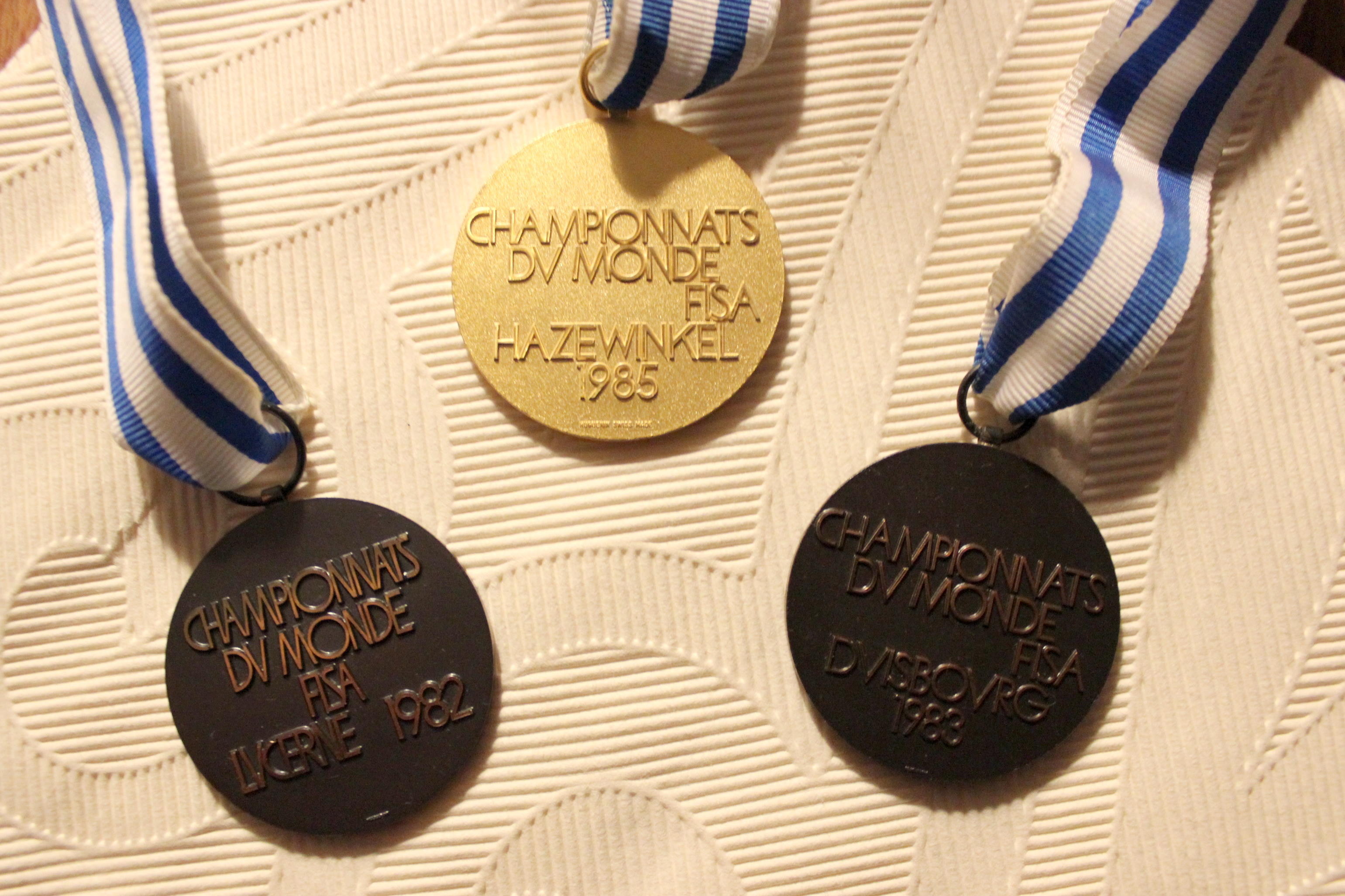 Goldmedaille Steffi Götzelt Weltmeisterschaften Hazewinkel 1985 im Vierer und Bronzemedaillen Steffi Götzelt Weltmeisterschaften Luzern 1982 und Duisburg 1983 im Achter.